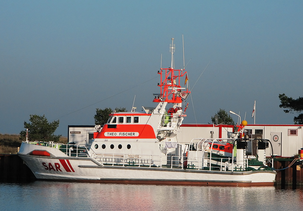 Beschreibung: SK Theo Fischer, im Hintergrund rechts die DGzRS-Station Darßer Ort Fotograf: Darkone, 30. Oktober 2005